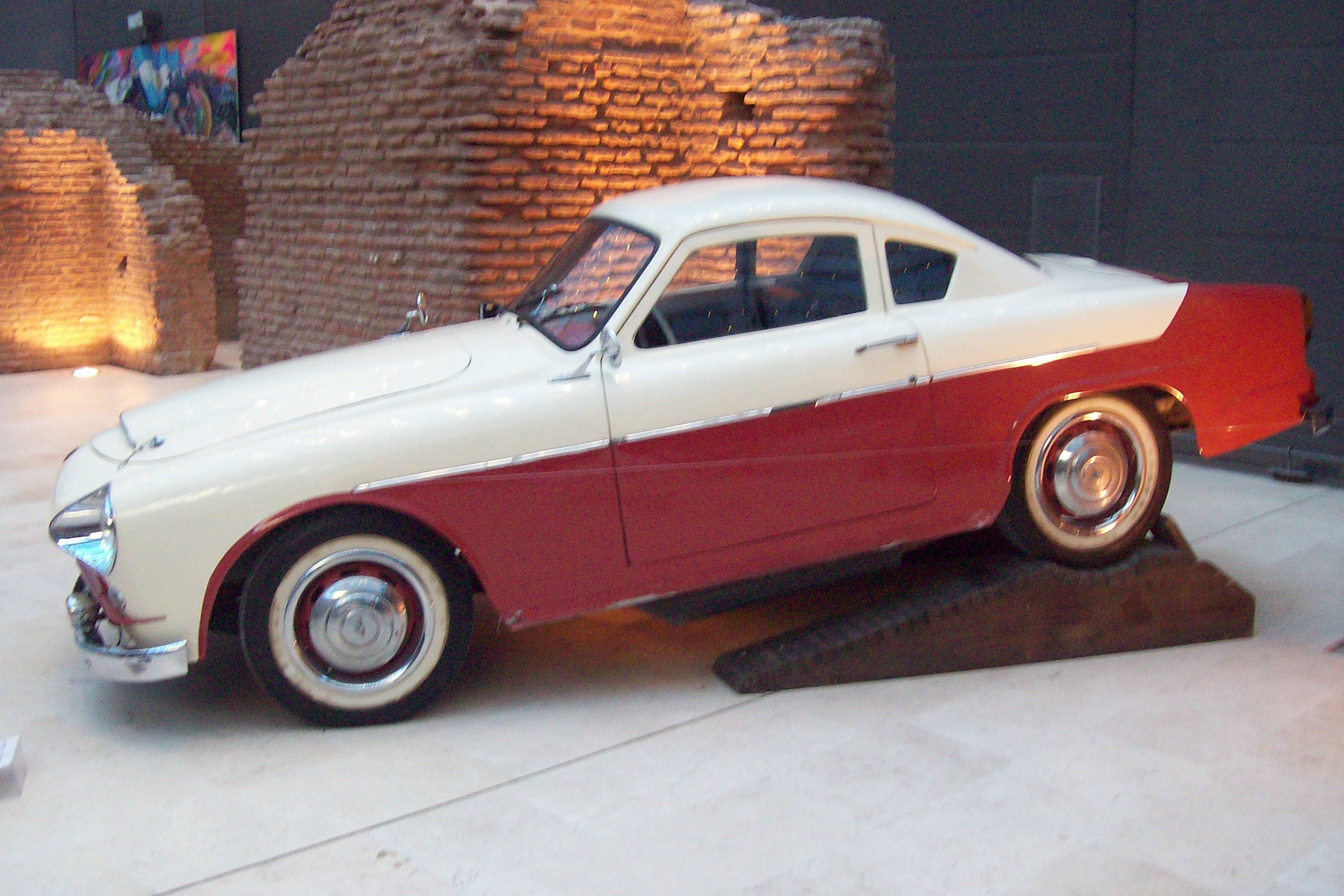 Un modelo Justicialista Gran Sport del año 1954 exhibido en el Museo del Bicentenario, Buenos Aires.